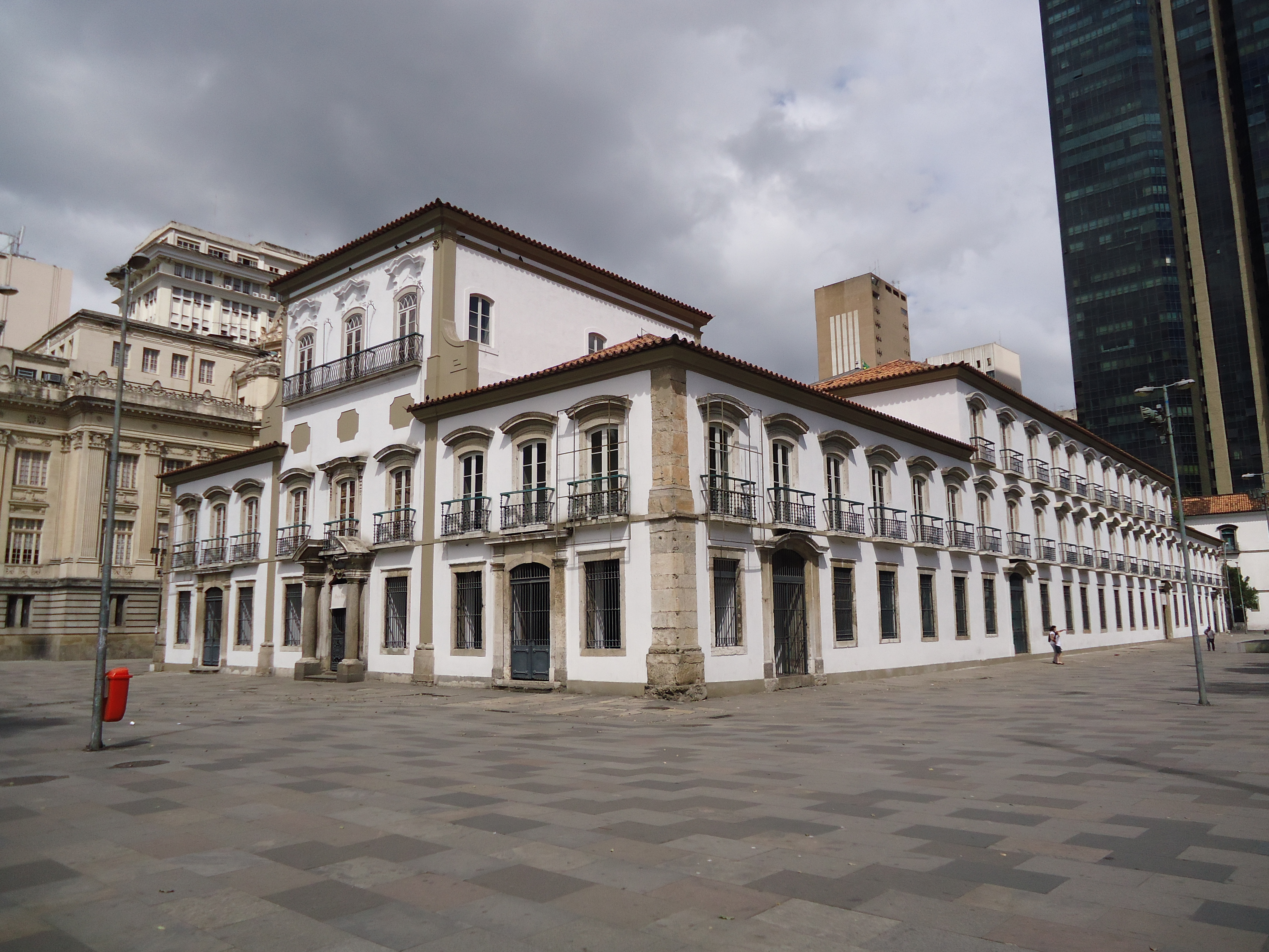 Praça XV, centro histórico da cidade do Rio de Janeiro, estado do Rio de Janeiro, Brasil: Paço Imperial.